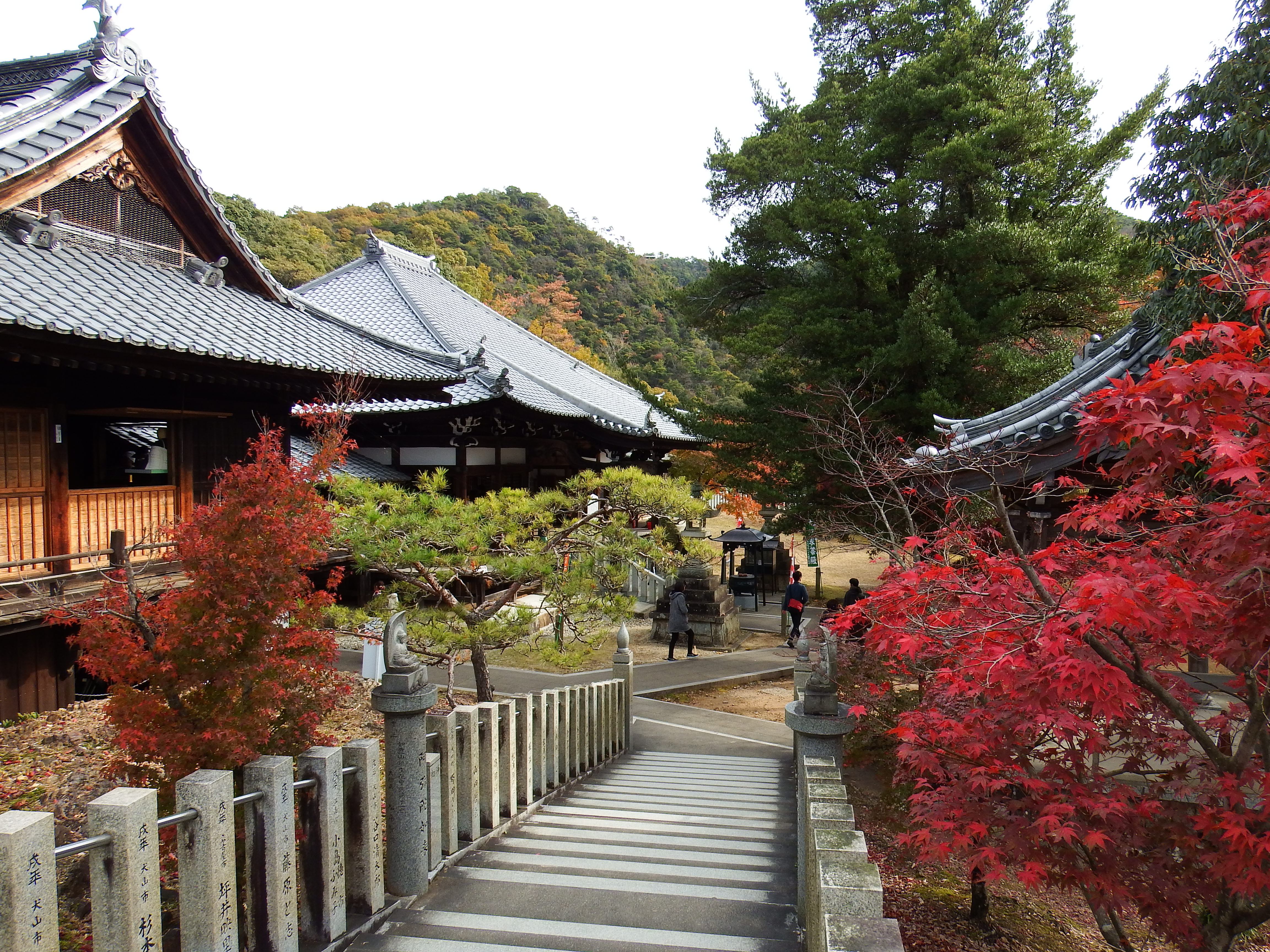 寂光院境内